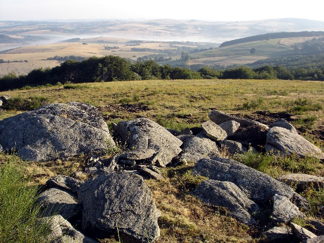 Le Lévézou, depuis les crêtes